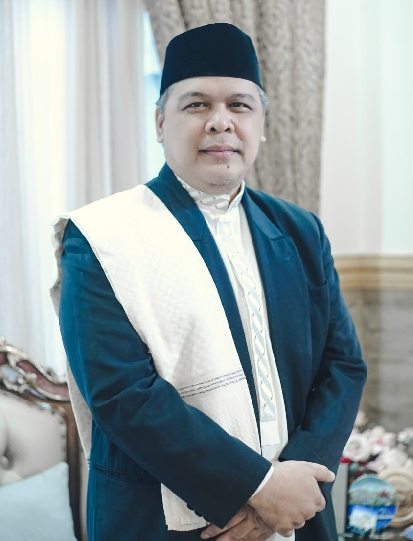 Foto ulama Dr. KH. Didi Supandi, M.A.